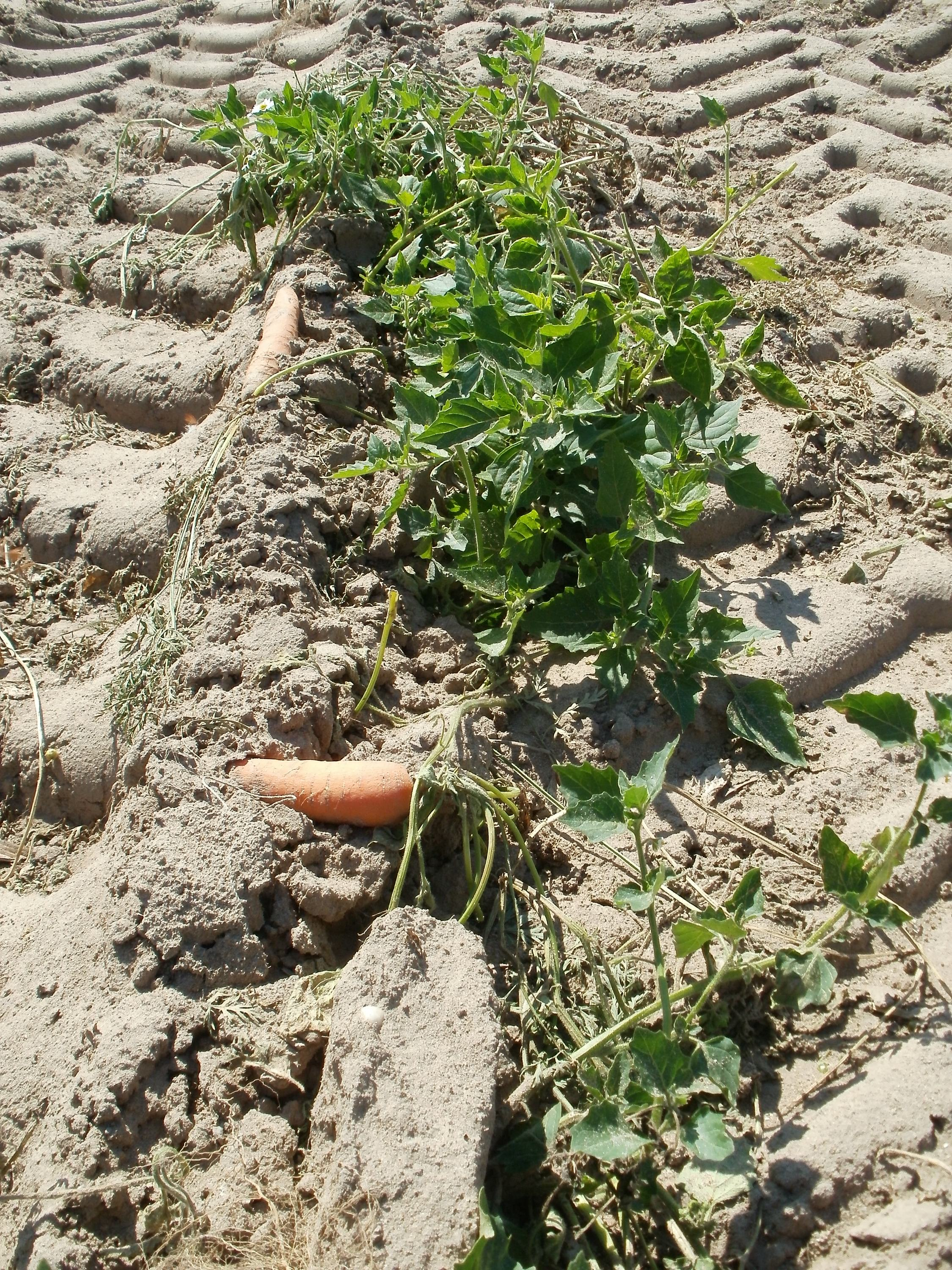 Abgeerntetes Karottenfeld bei Ketsch